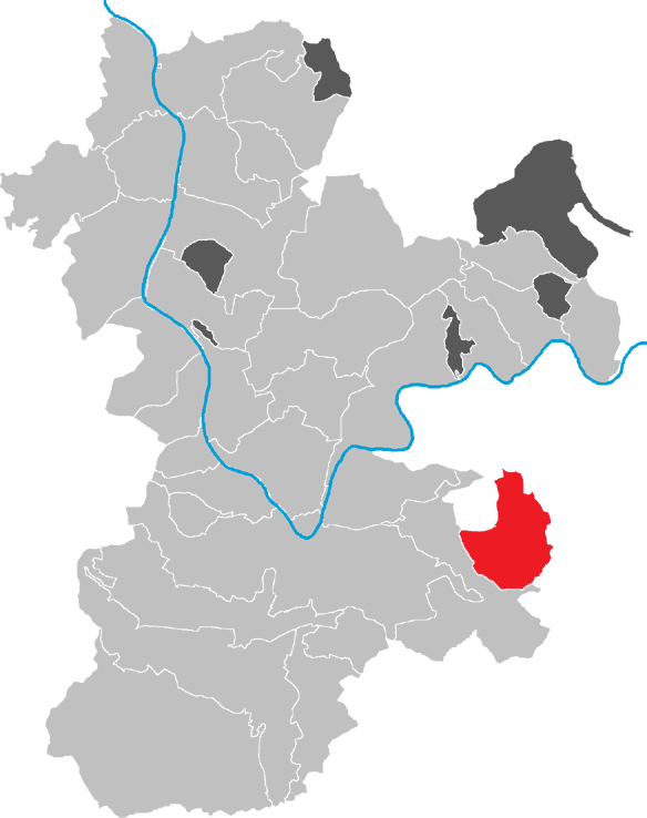 Karte von Neunkirchen im Kreis Miltenberg, Bayern, Deutschland.